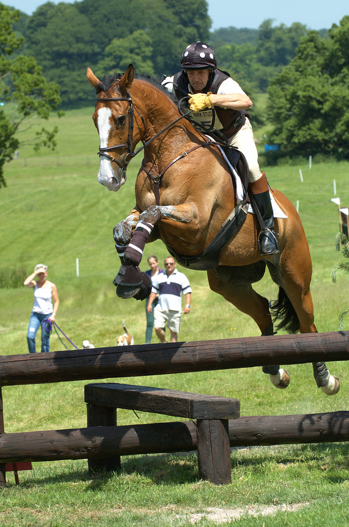 Pumped